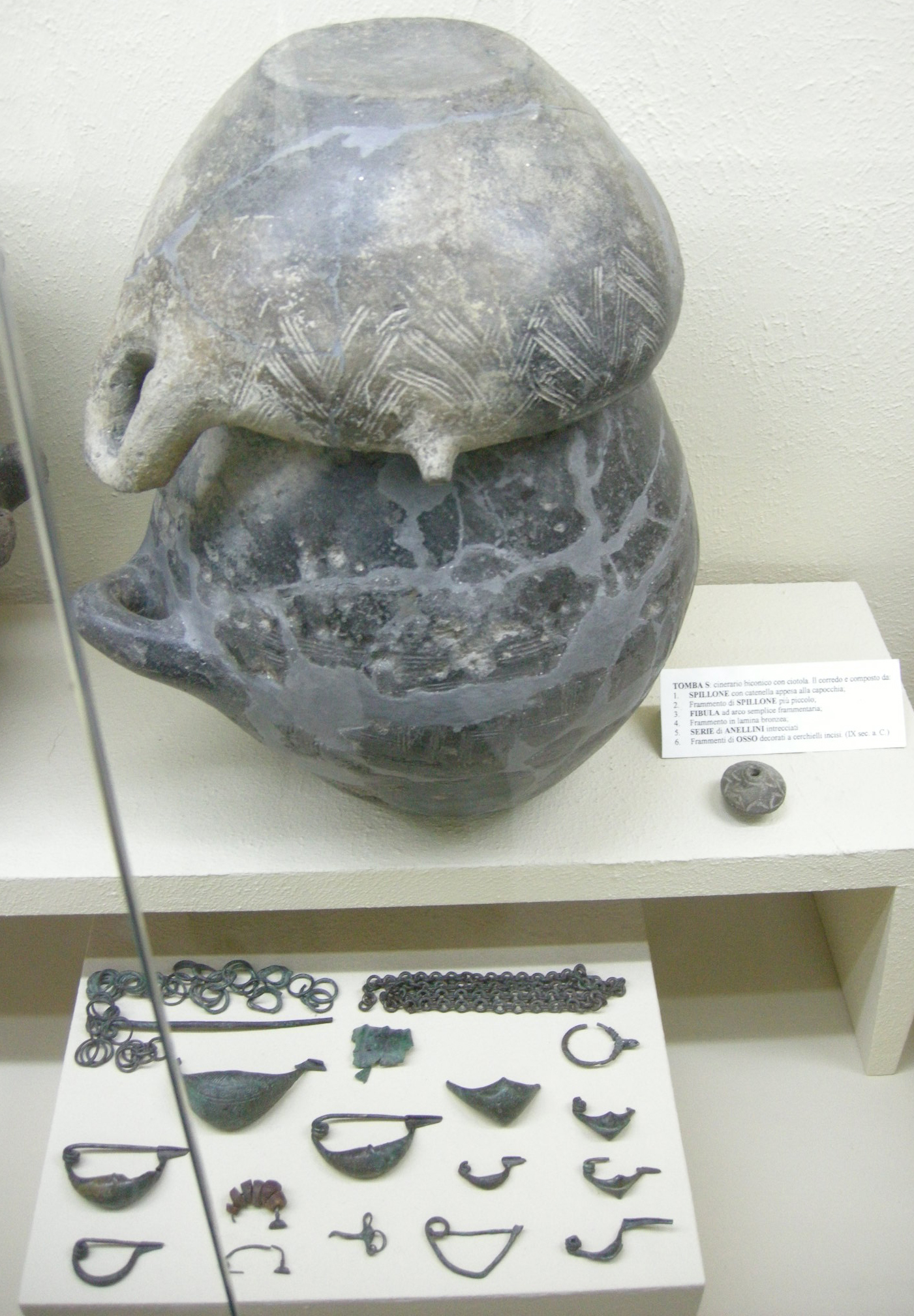 Museo guarnacci, urne cinerarie villanoviane